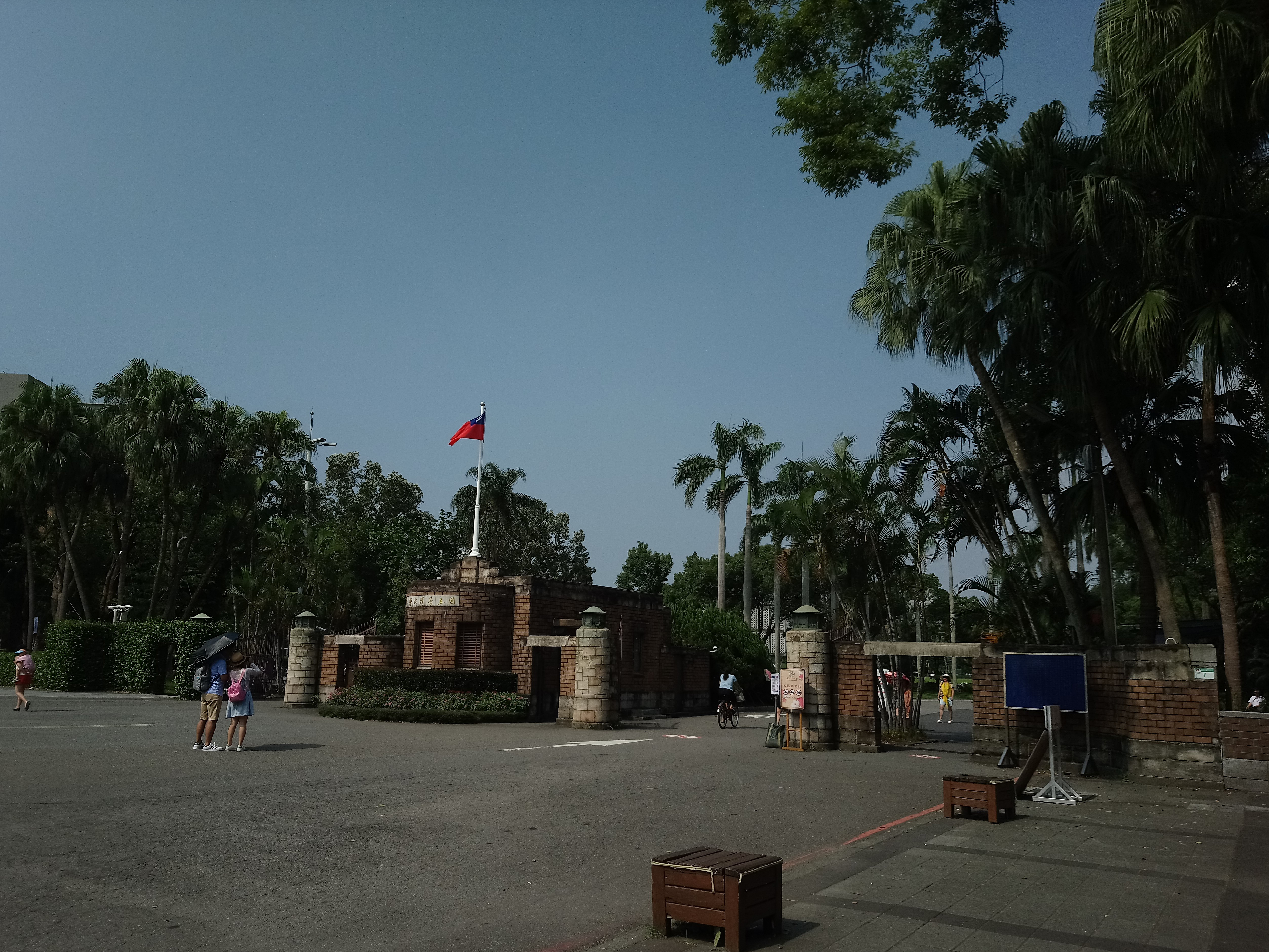 國立台灣大學校門,台北市大安區學府次分區學府里